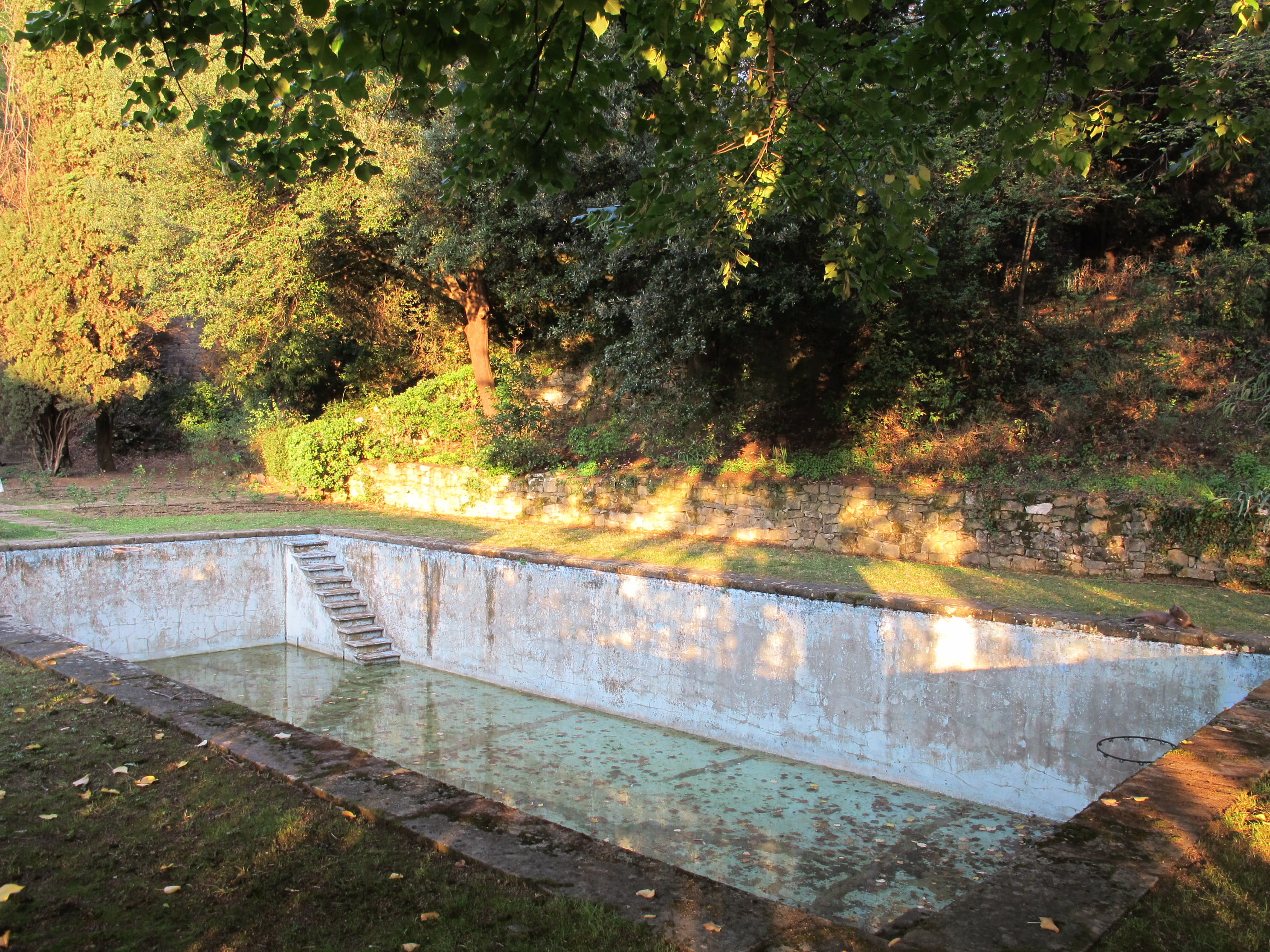 Villa sparta, parco, piscina rasoterra